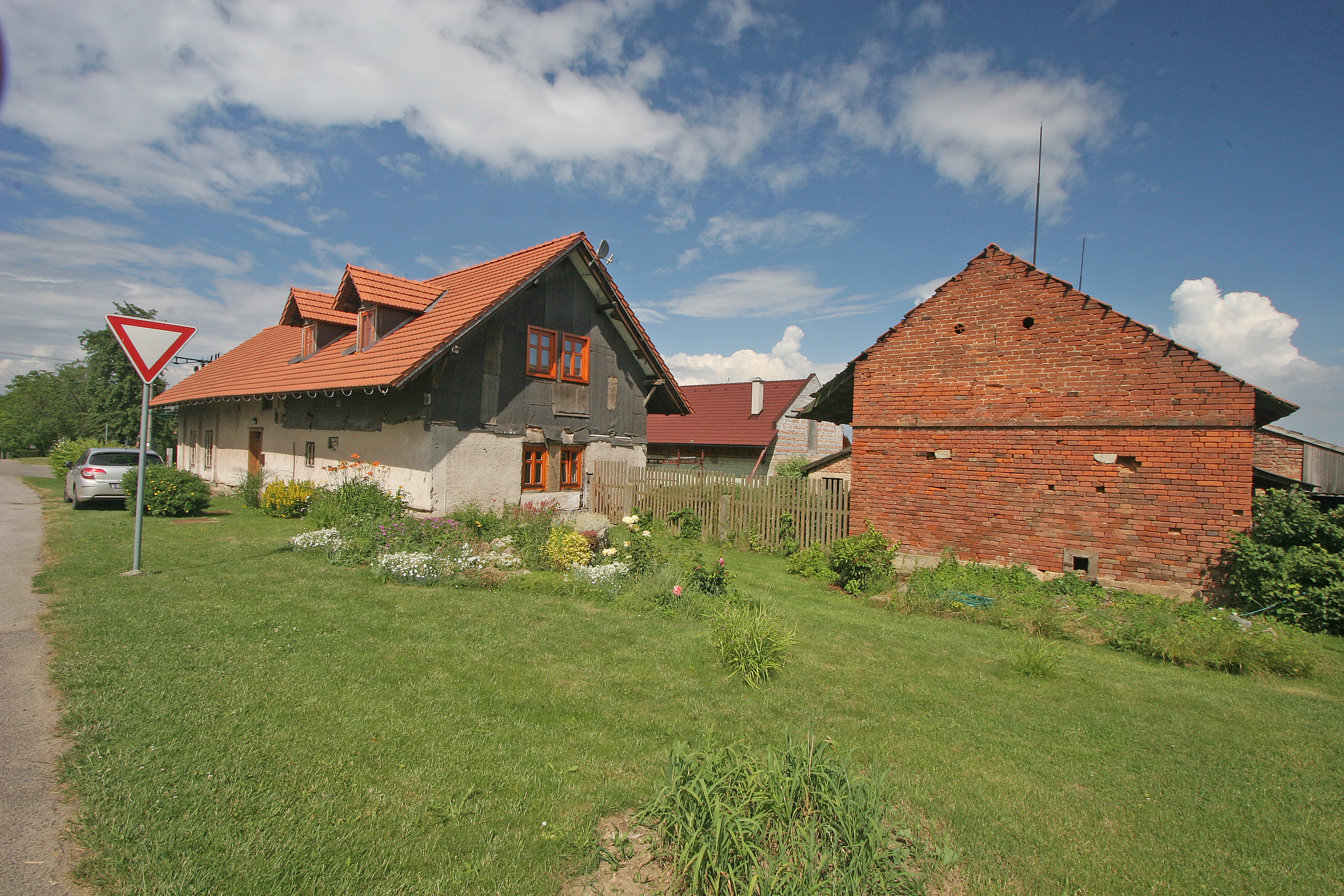 Horní Černůtky - bývalá hospoda U Pražáků